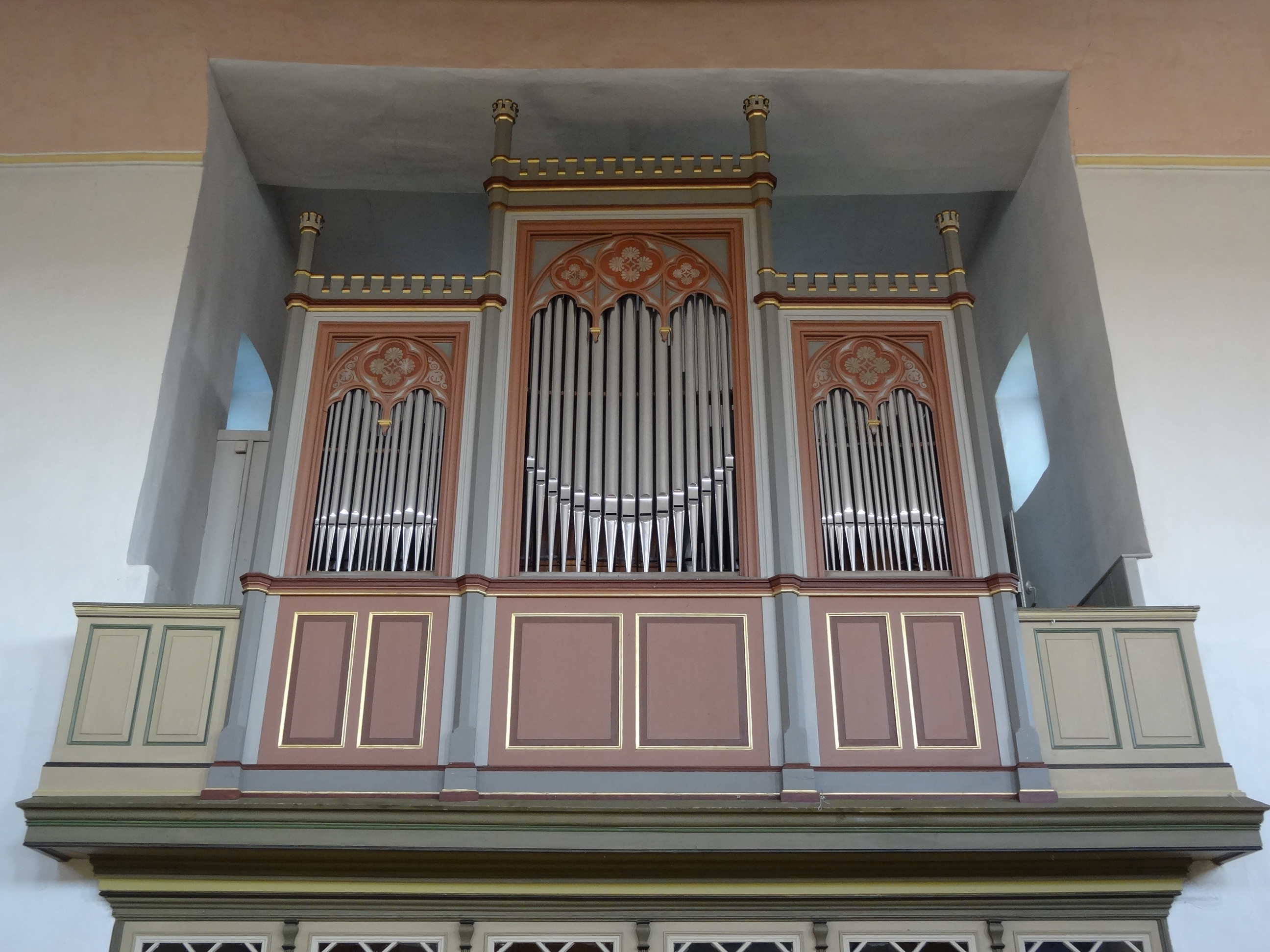 Evangelische Kirche Bellersheim